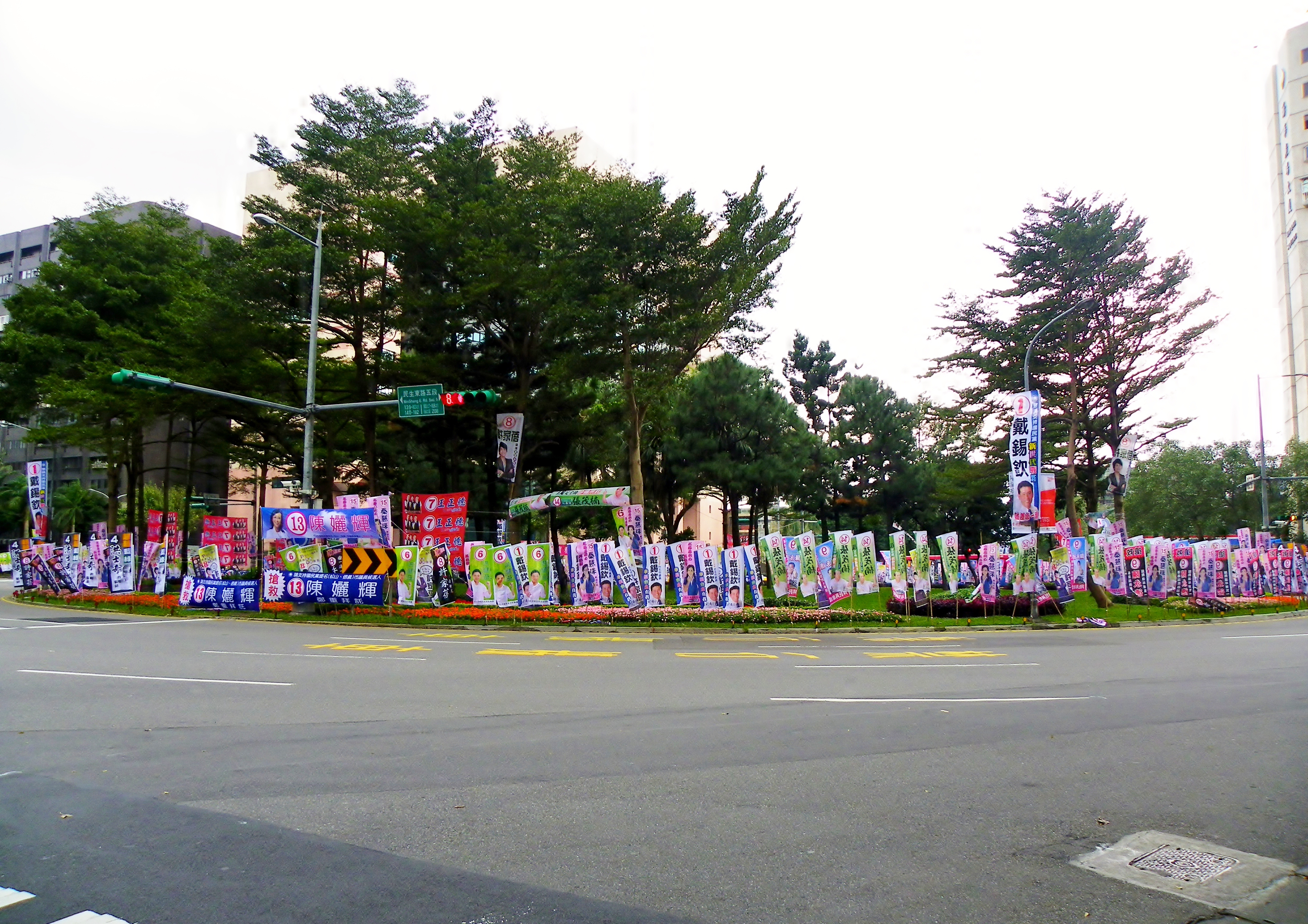 2010年臺灣五都大選競選活動期間，周圍插滿市議員候選人旗幟的臺北市松山區民生圓環。